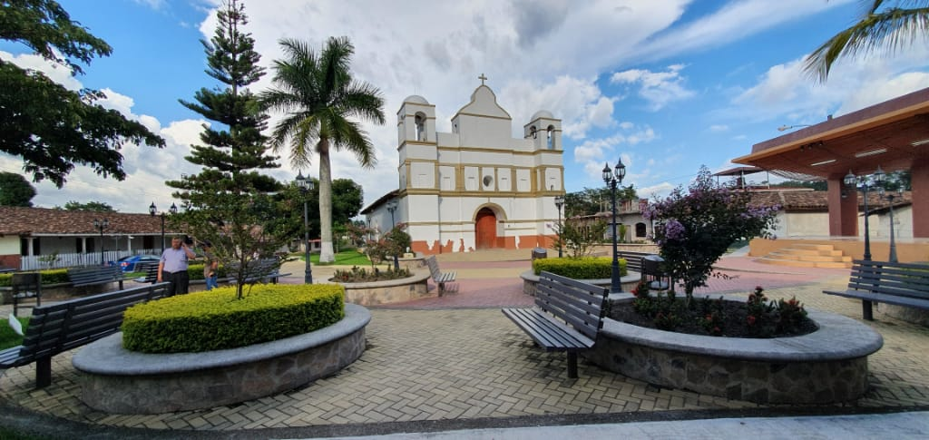 Plaza Cnetral del municipio de Tambla.